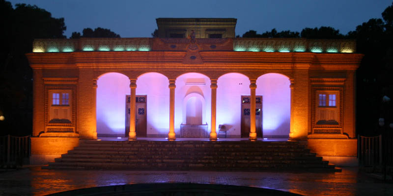 Atashkadeh (Temple du feu zoroastrien) à Yazd au coucher du soleil, copyright Jan Egil Kirkebø, 2005